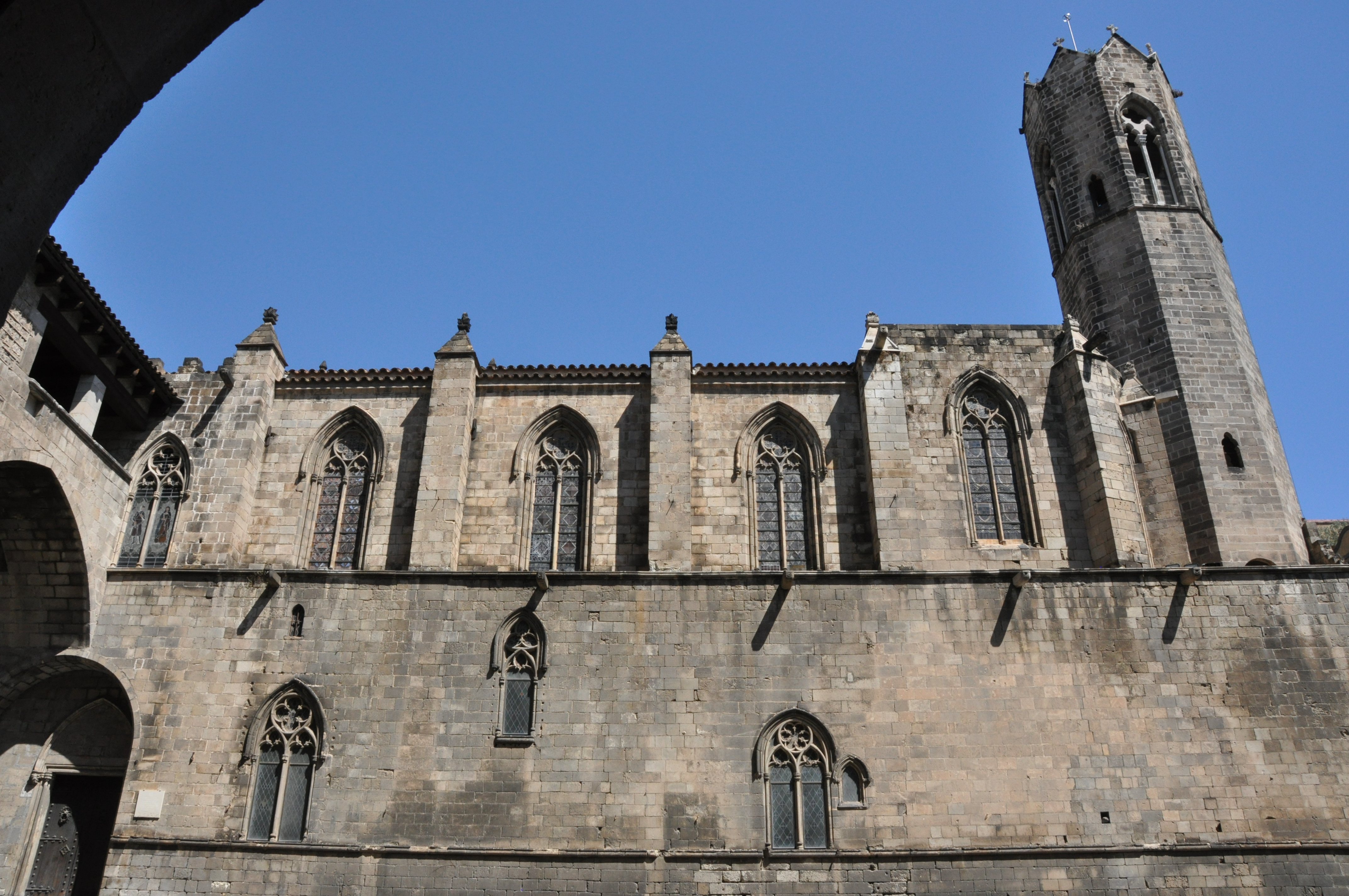 Palau reial major Capella de santa agata Exterior des de la plaça del Rei